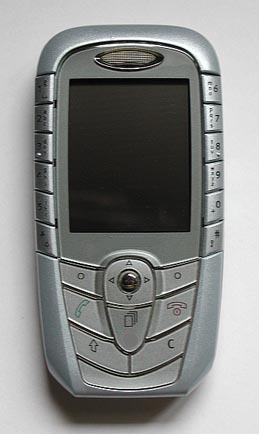 Erstellt aus Bild:Siemens-sx1.jpg, also ebenfalls .